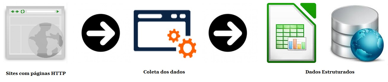 Web scraping technology